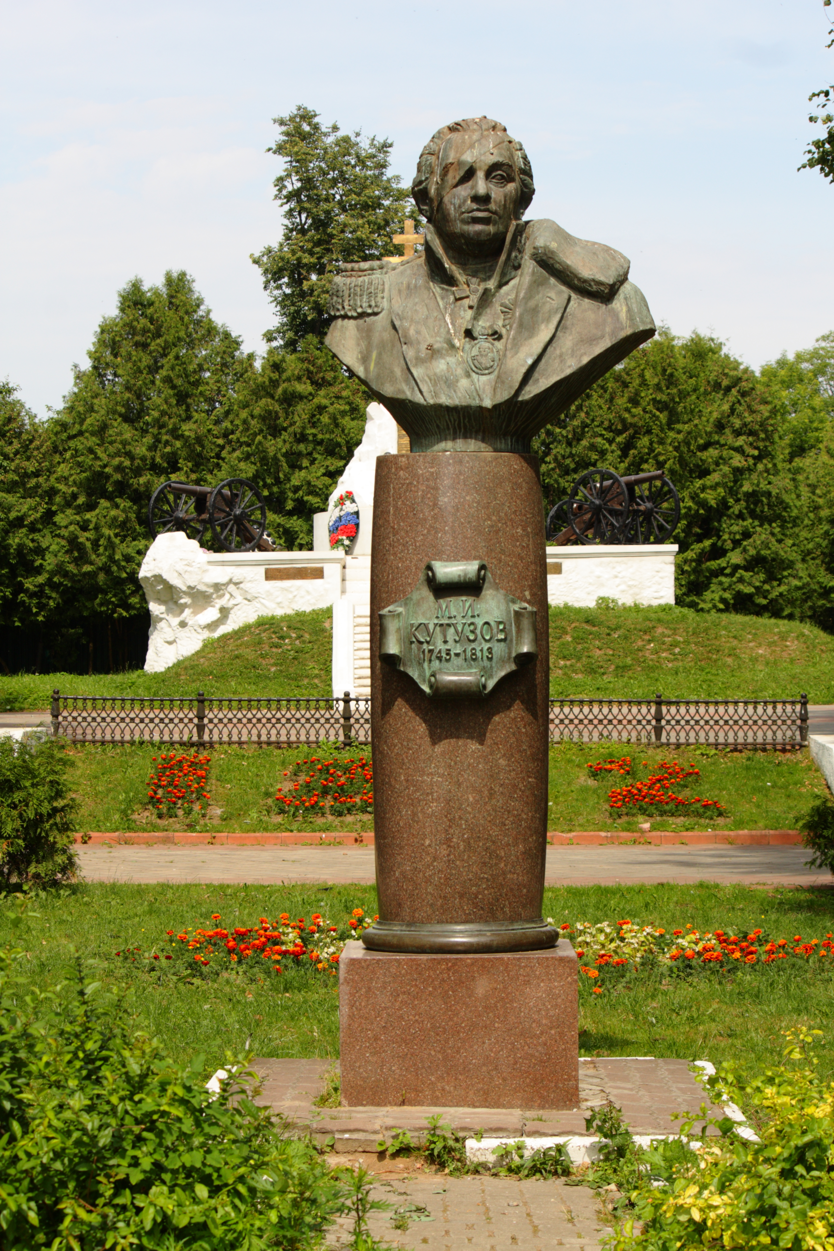 Памятник М. И. Кутузову: Московская ул., сквер 1812 Года, Малоярославец, Малоярославецкий район, Калужская область